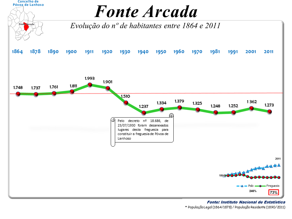 Censos 1864/2011